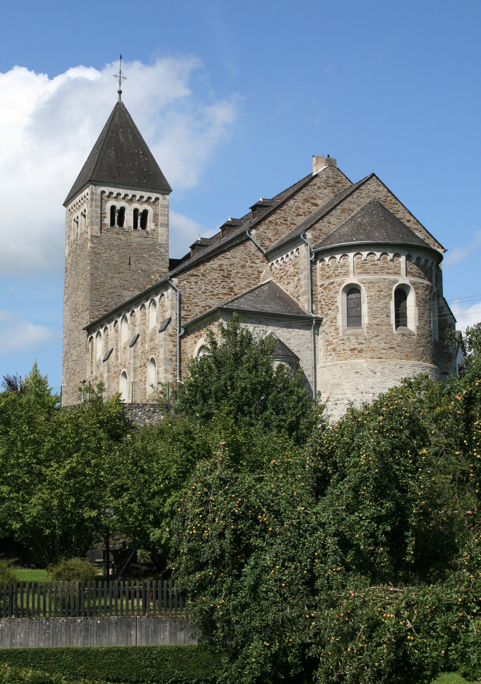 Pfarrkirche "St. Katharina" Niedererbach